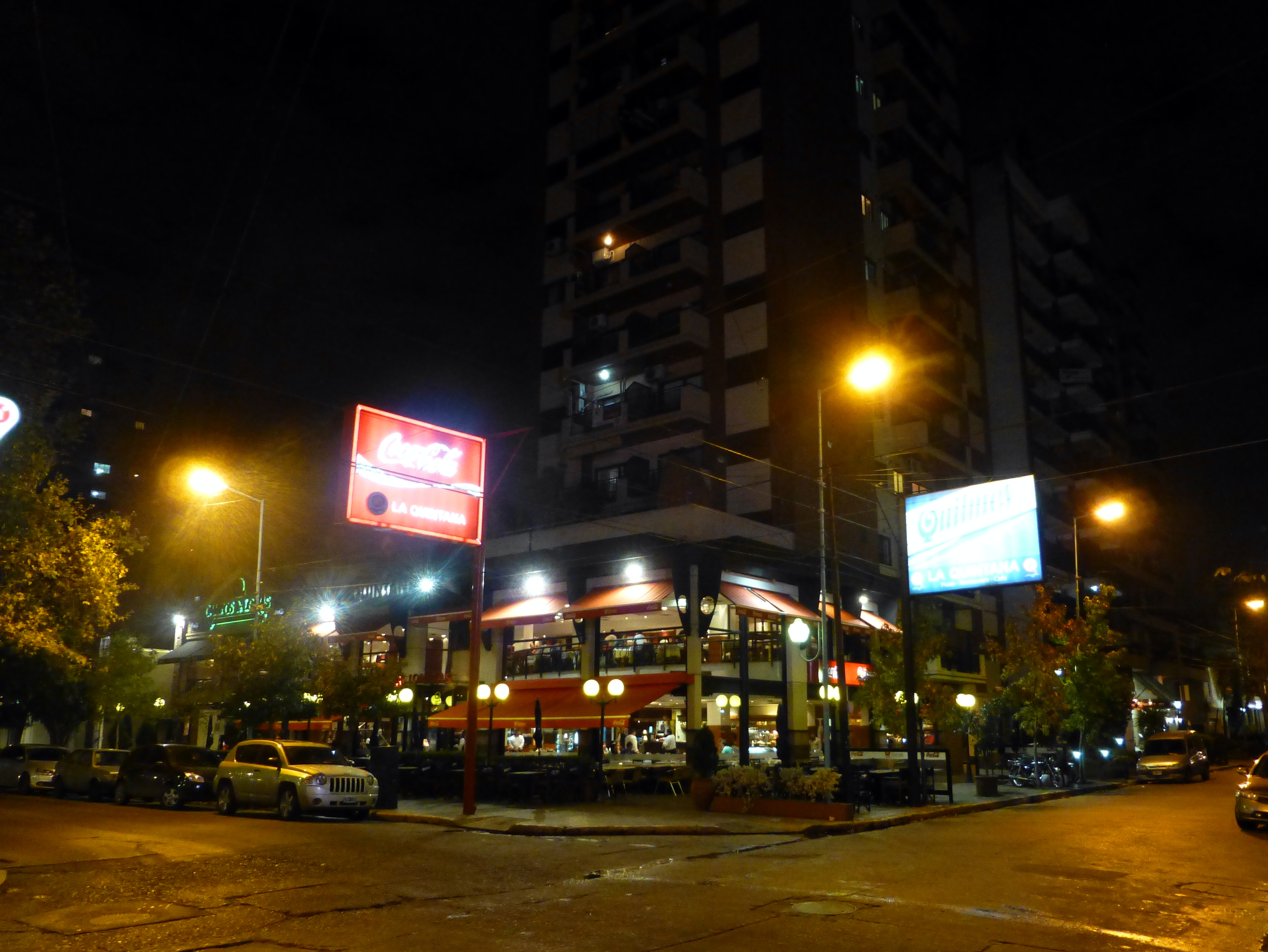 Barrio Las Lomitas, Lomas de Zamora, Argentina